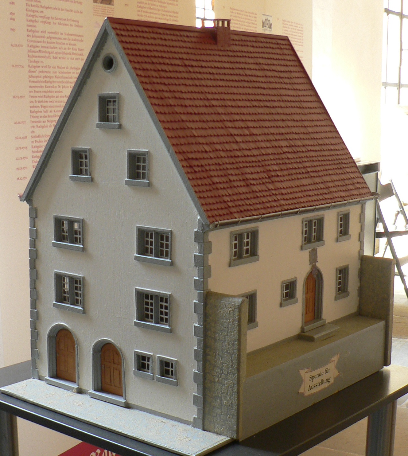 Geburtshaus von Valentin Rathgeber. Ausstellung im Diözesanmuseum Bamberg. (Valentin Rathgeber Gesellschaft, Berthold Gaß).